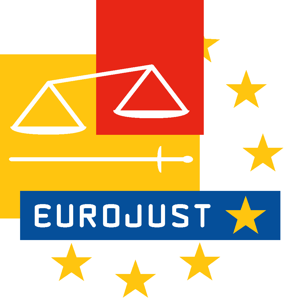 Logo der Eurojust, der Einheit für justizielle Zusammenarbeit der Europäischen Union